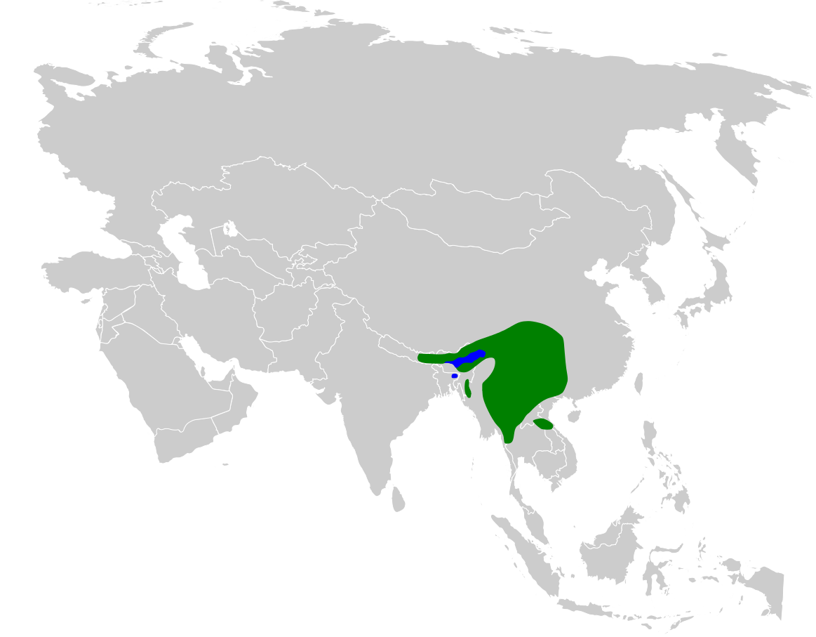 Tesia olivea distribution map, based on